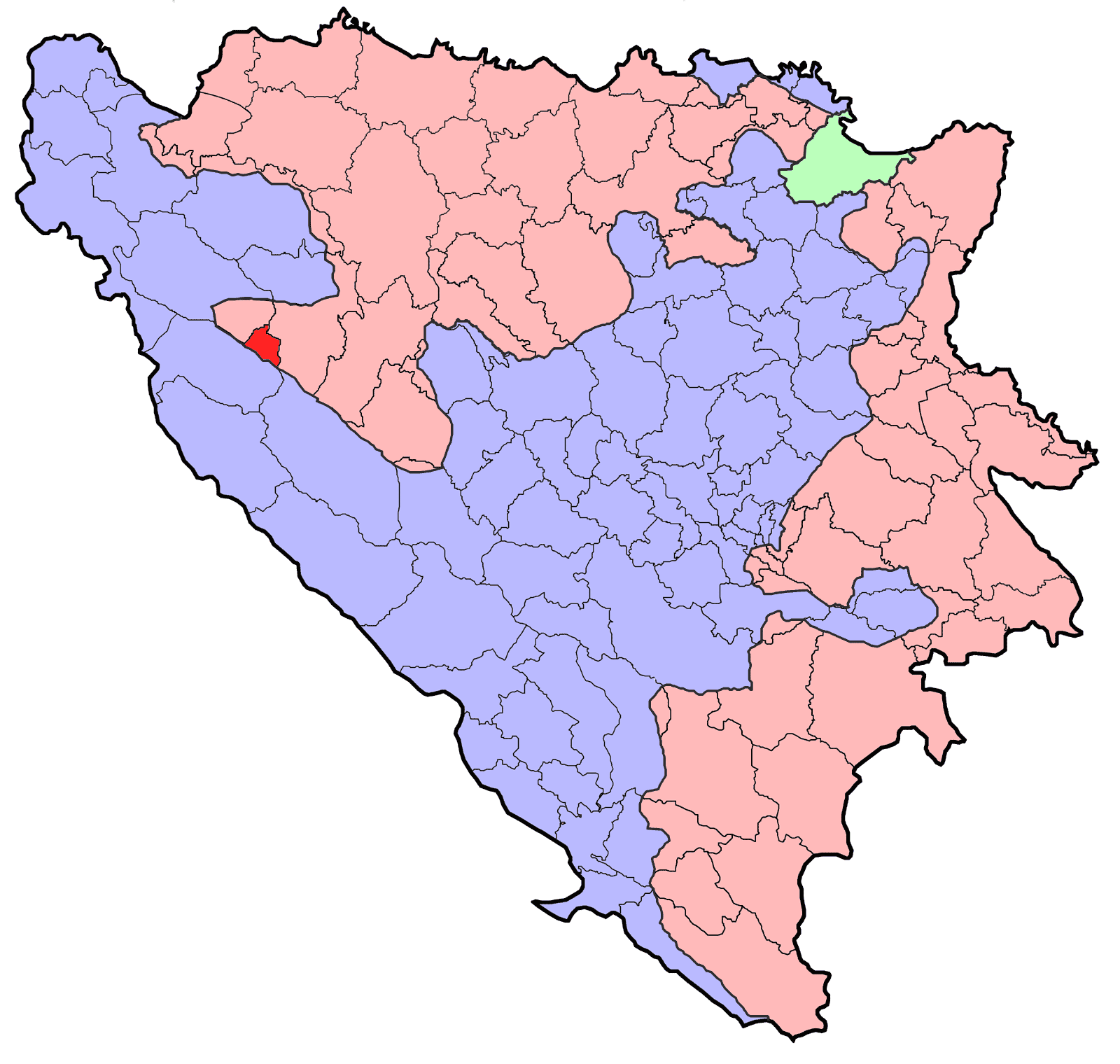 Republika Srpska (BiH) municipality